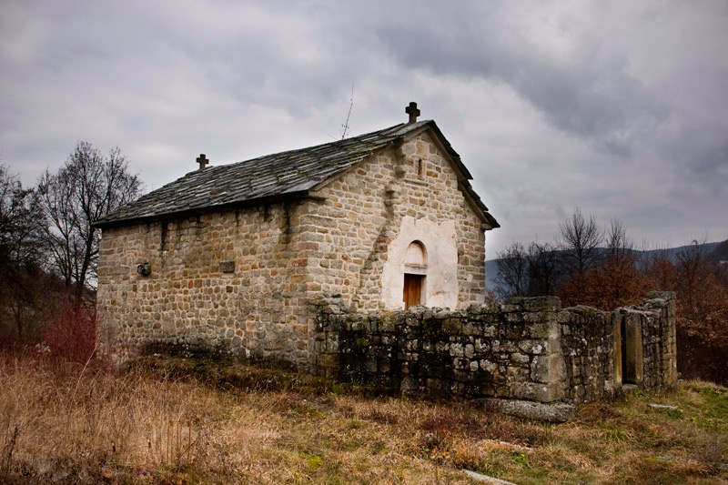 Српски (ћирилица): Црква у Попама, фото: Бојан Миловић